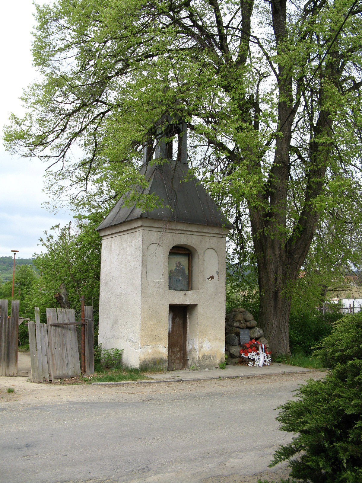 Kaplička se zvonicí (Sněhotice), při silnici do Ondratic, Sněhotice